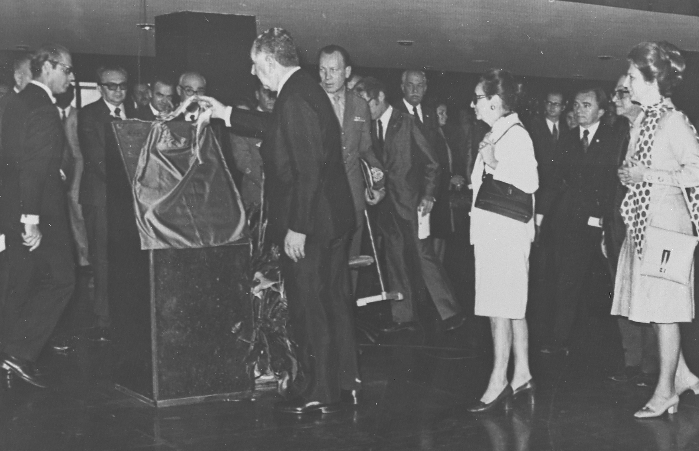 Imagem do Fundo Agência Nacional, do Arquivo Nacional